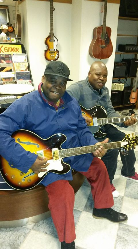 Kiswahili: Dekula Kahanga akiwa na Maneno Uvuruge huko mjini Stockholm Uholanzi mnamo tarehe 13/04/2017.